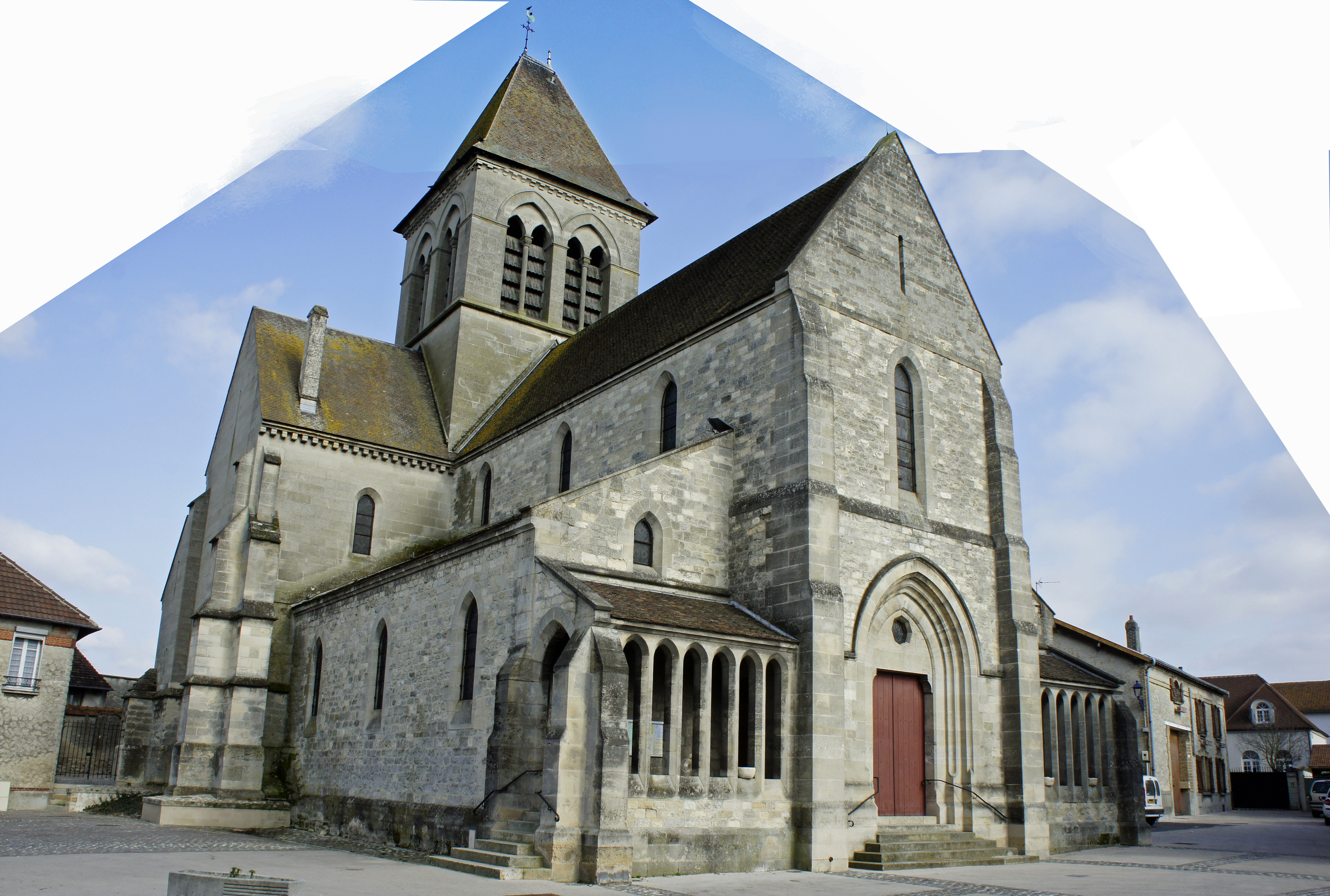 Église_st-Sébastien à Betheny.